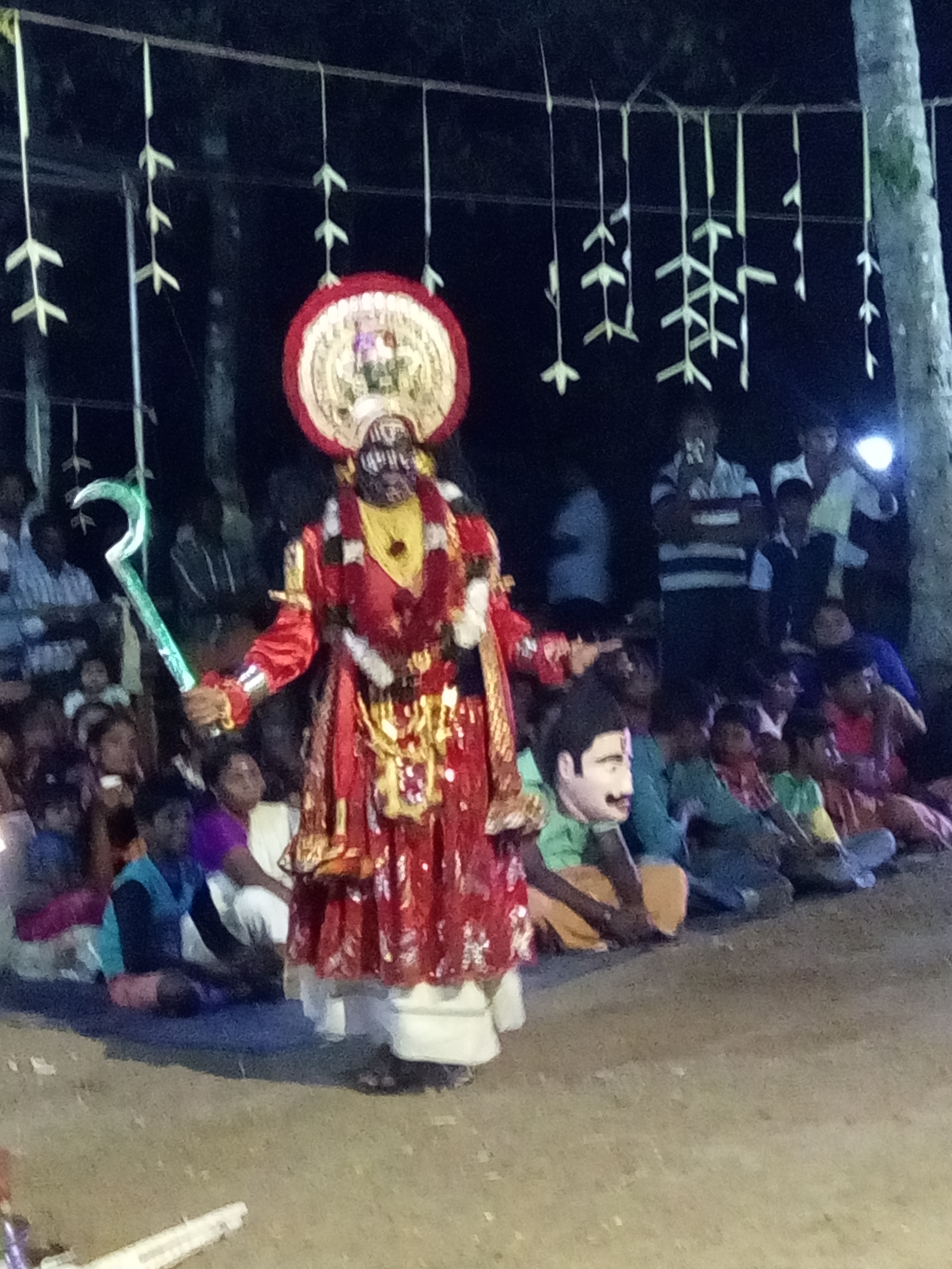 Bhadrakali theeyattu at kallumala on 1st march 2017